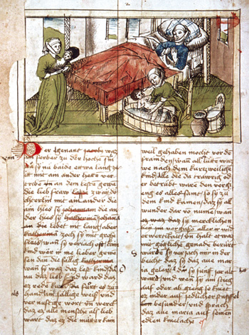 Ignoto della Scuola di Norimberga, Nascita di Caterina e Giovanna, Legenda Maior in dialetto svevo, sec. XV (1466), Berlino, Kupferstichkabinett, Hs. 78. A. 14, f. 2v